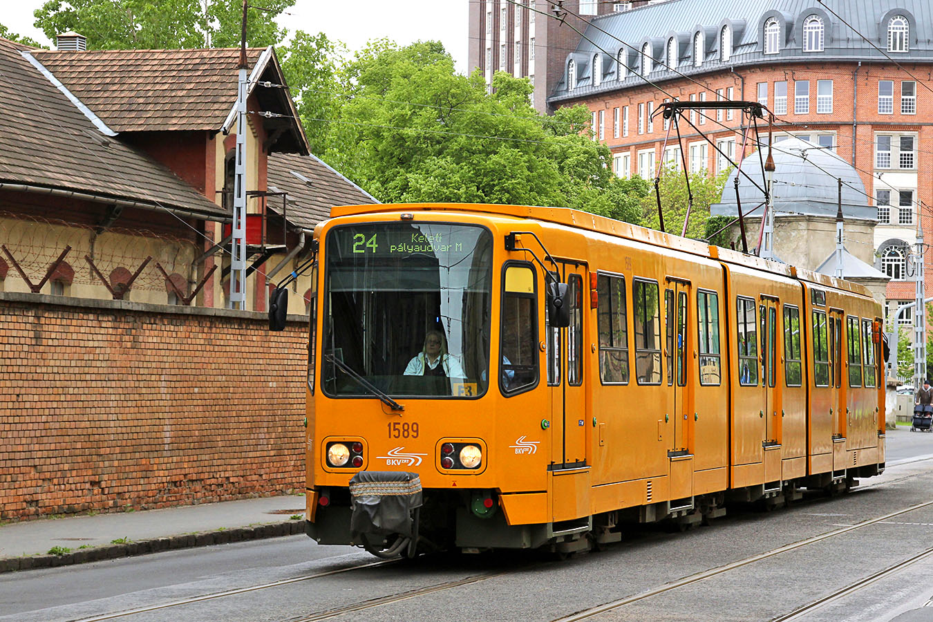 TW 6000 típusú villamos a Festetics György utcában